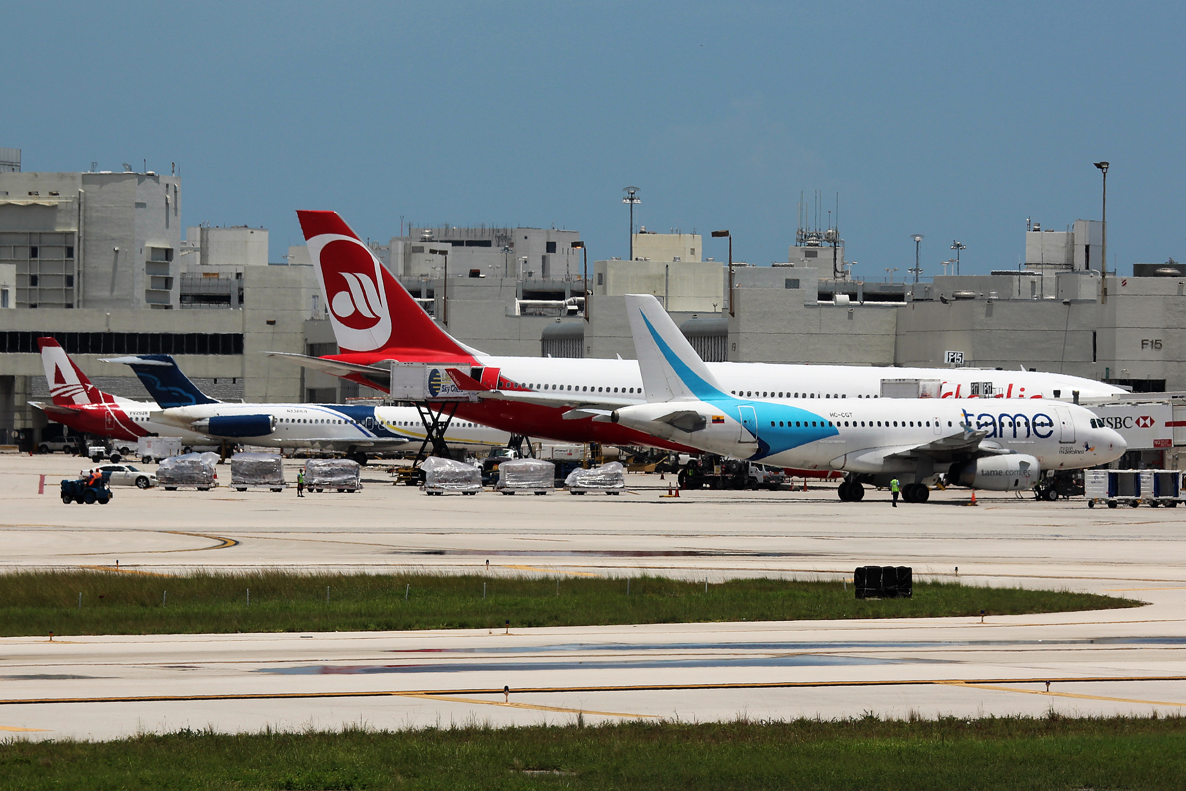 Flugzeuge am Miami International Airport